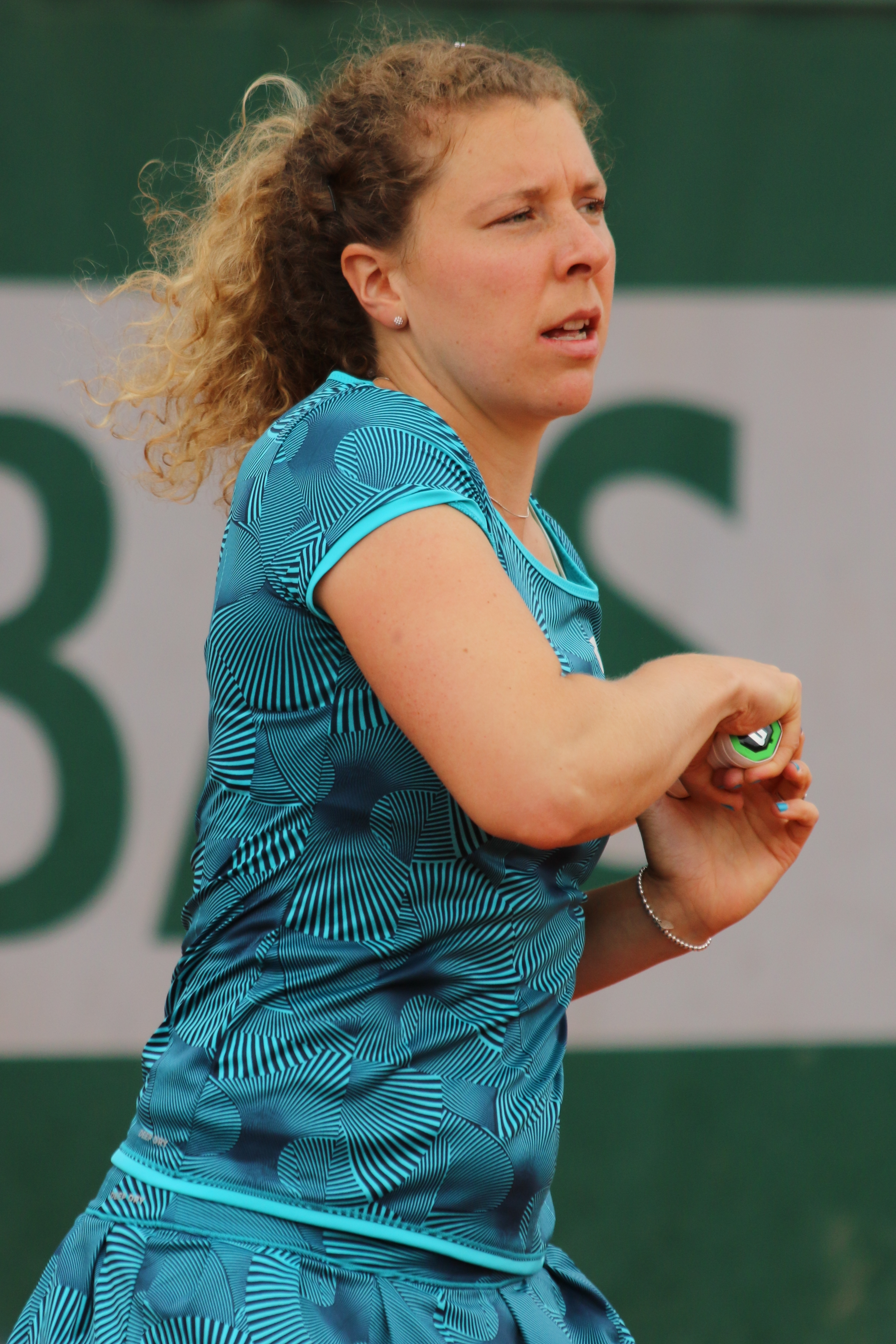 Friedsam RG19